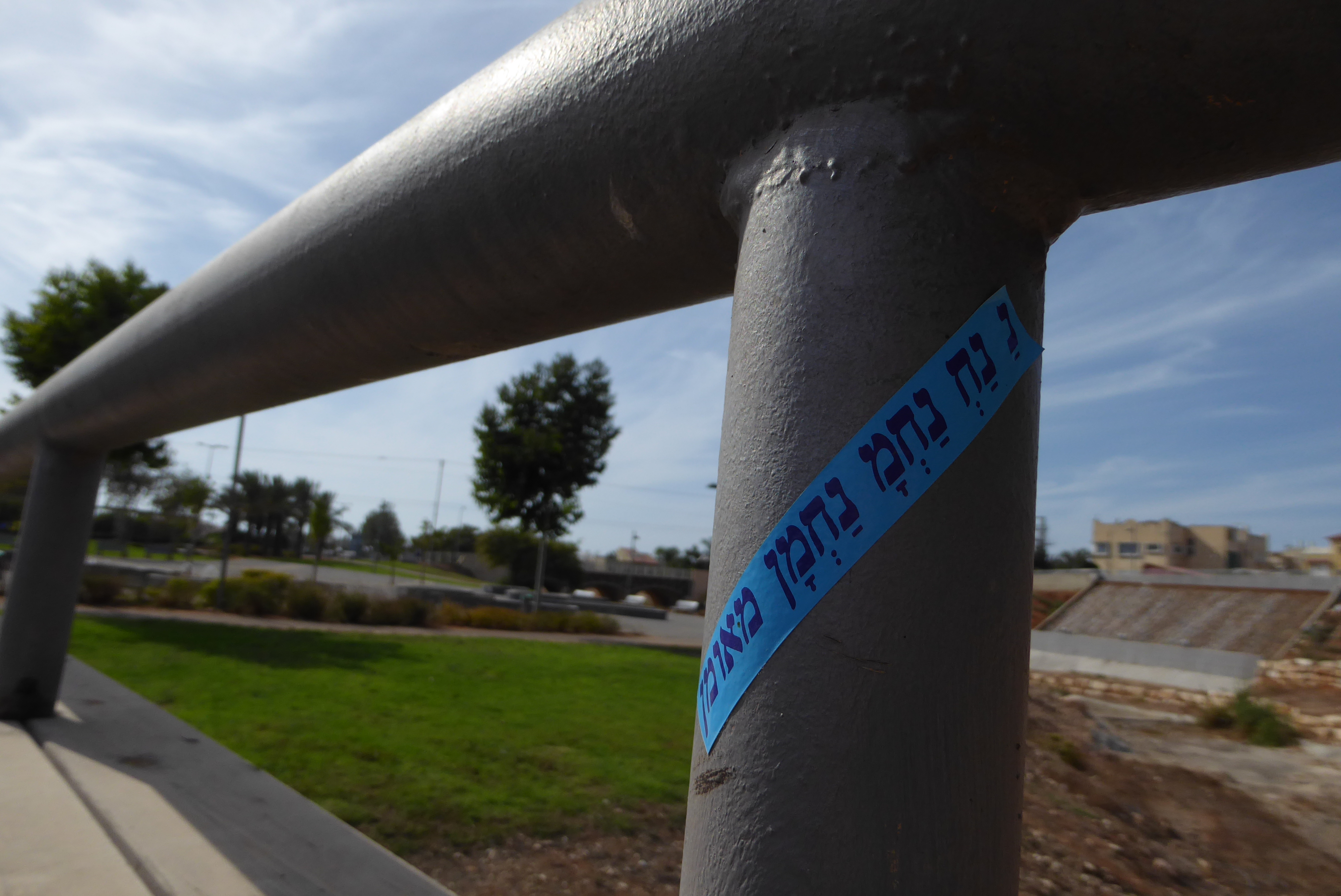 גשר בריטי בראש העין. רח' יהודה הלוי פינת מנחם בגין, ראש העין